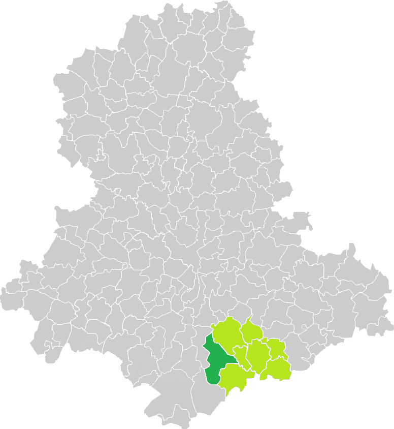 Carte de situation de la commune de Château-Chervix (en vert foncé) dans le votre Canton (en vert clair) sur une carte des communes de la Haute-Vienne